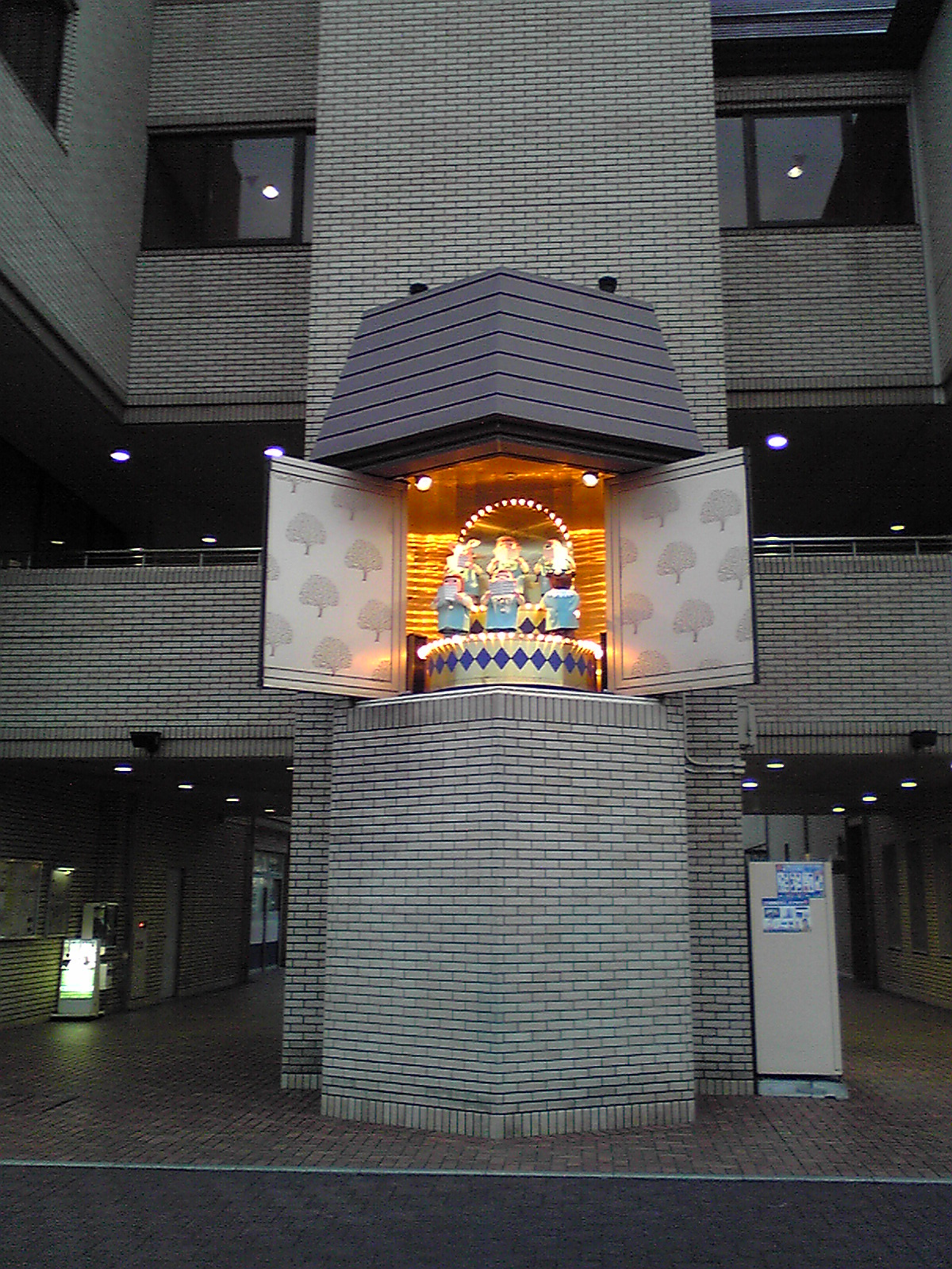 1 Chome-2 Matsuodai, Inagawa-chō, Kawabe-gun, Hyōgo-ken 666-0261, Japan